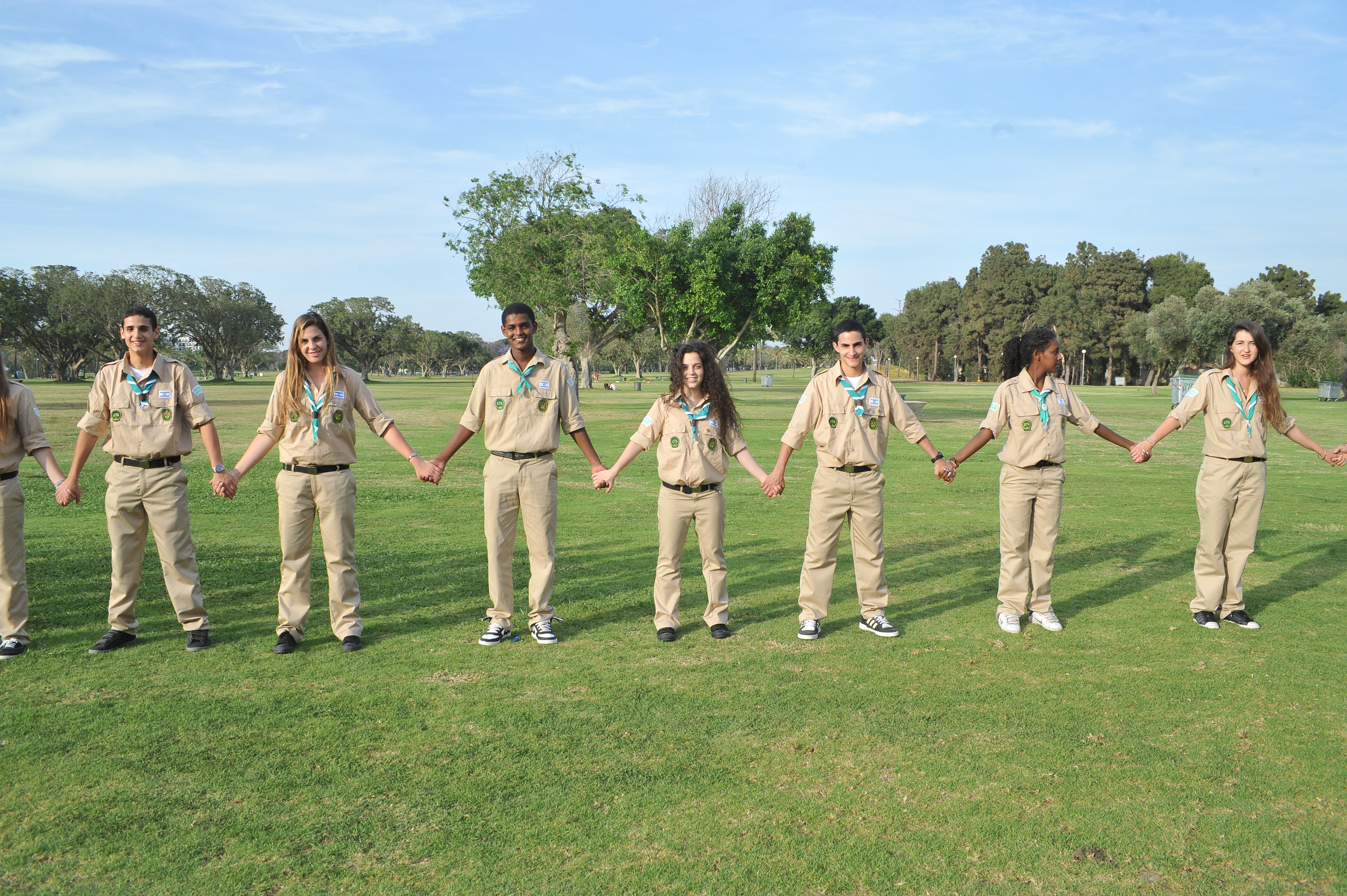 חניכי תנועת הצופים העבריים בישראל